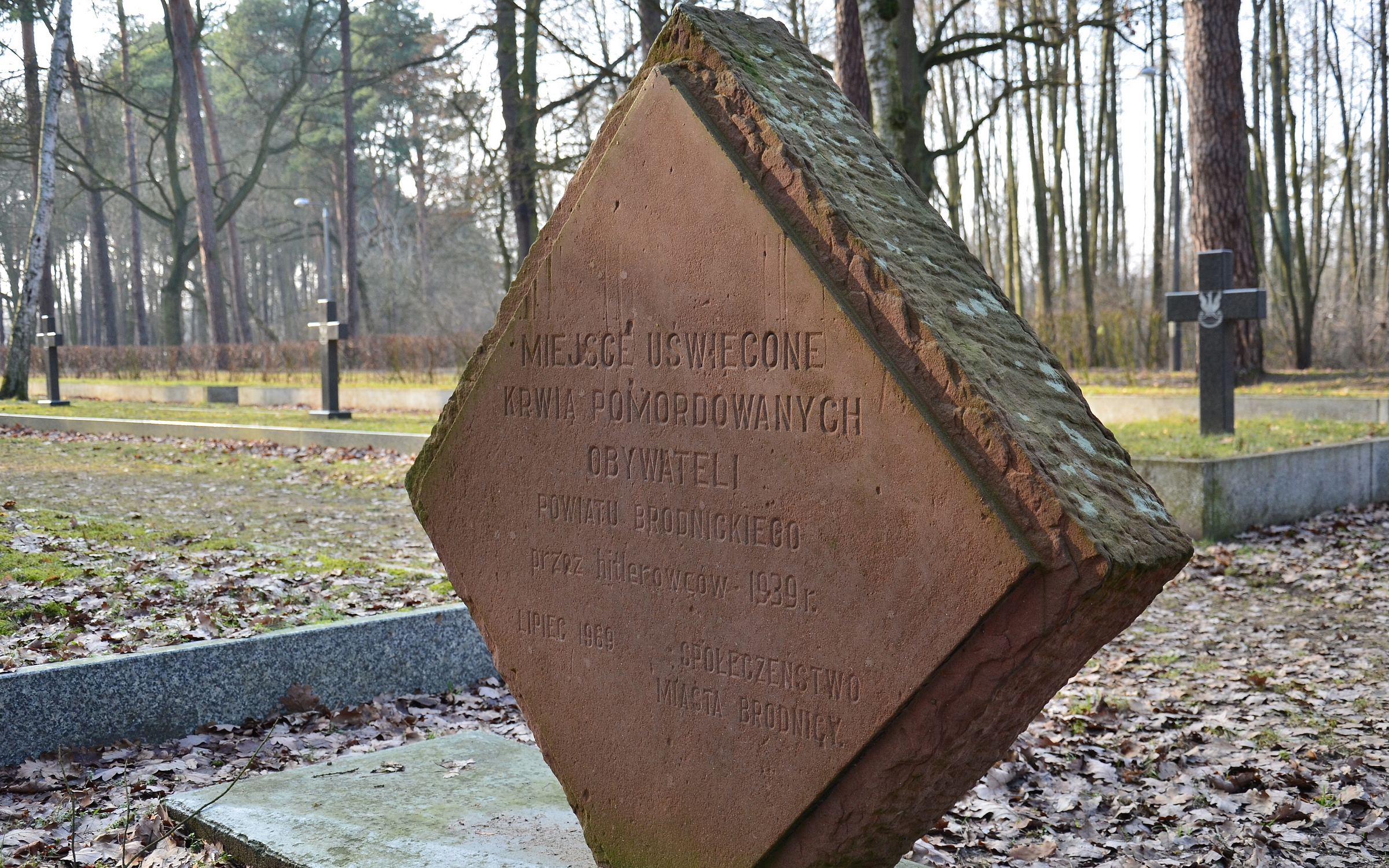 Cmentarz wojskowy w Brodnicy